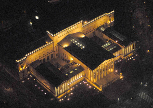 Szépművészeti Múzeum éjszaka - Budapest - Hungary - Europe